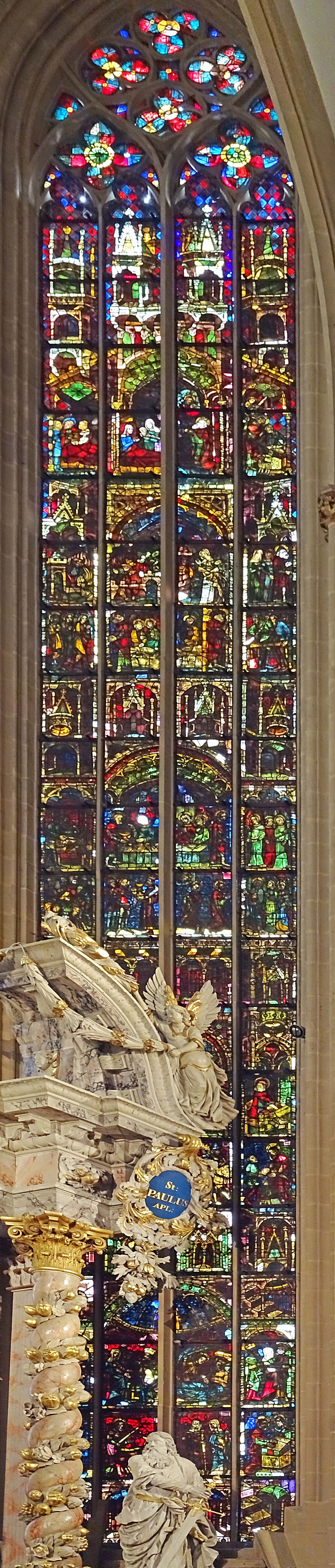 Abrahamfenster (sIII) im Hohen Chor des Erfurter Doms St. Marien